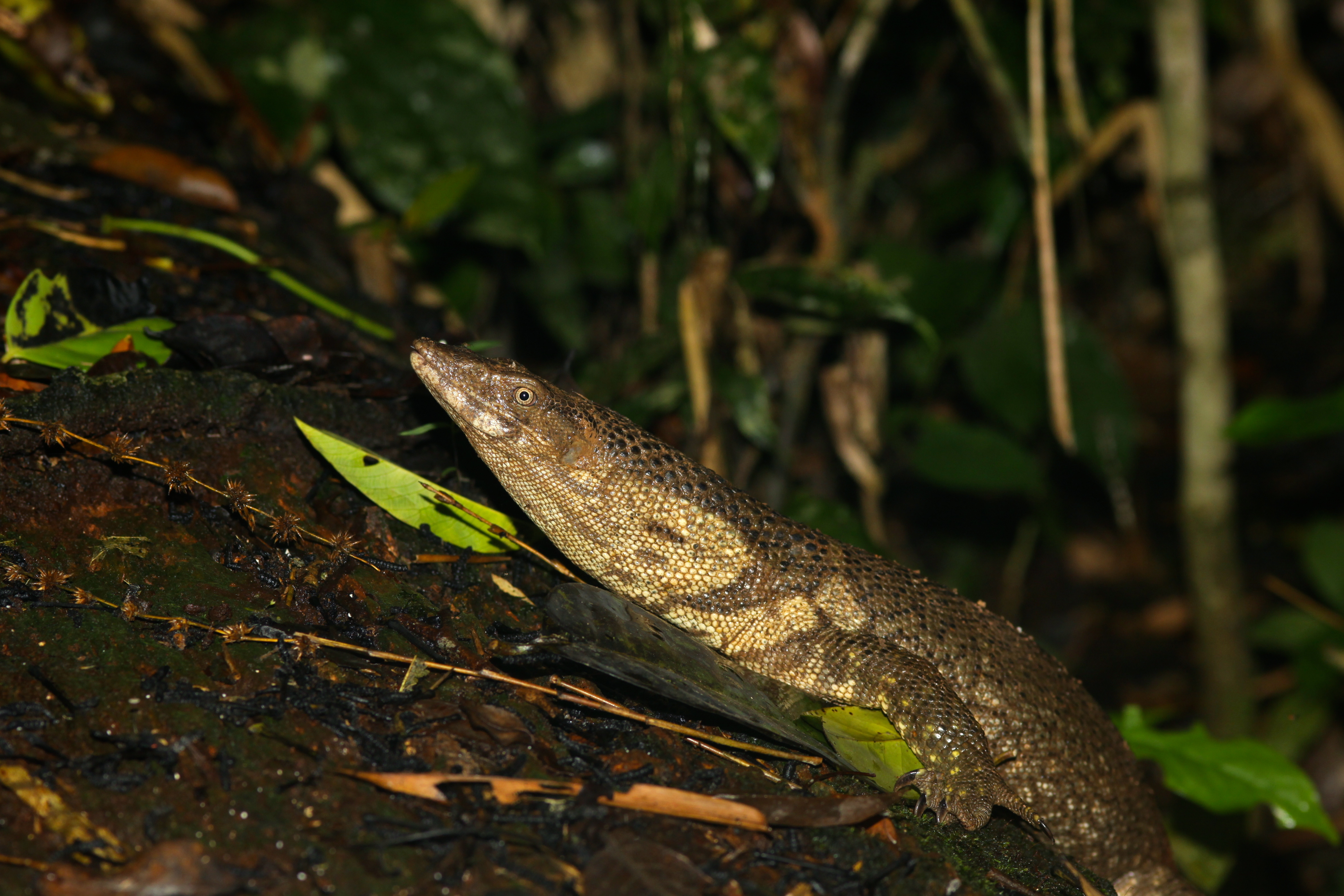 Taman Negara NP, Pahang, MALAYSIA